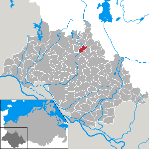 Bandenitz in Mecklenburg-Vorpommern - district Ludwigslust